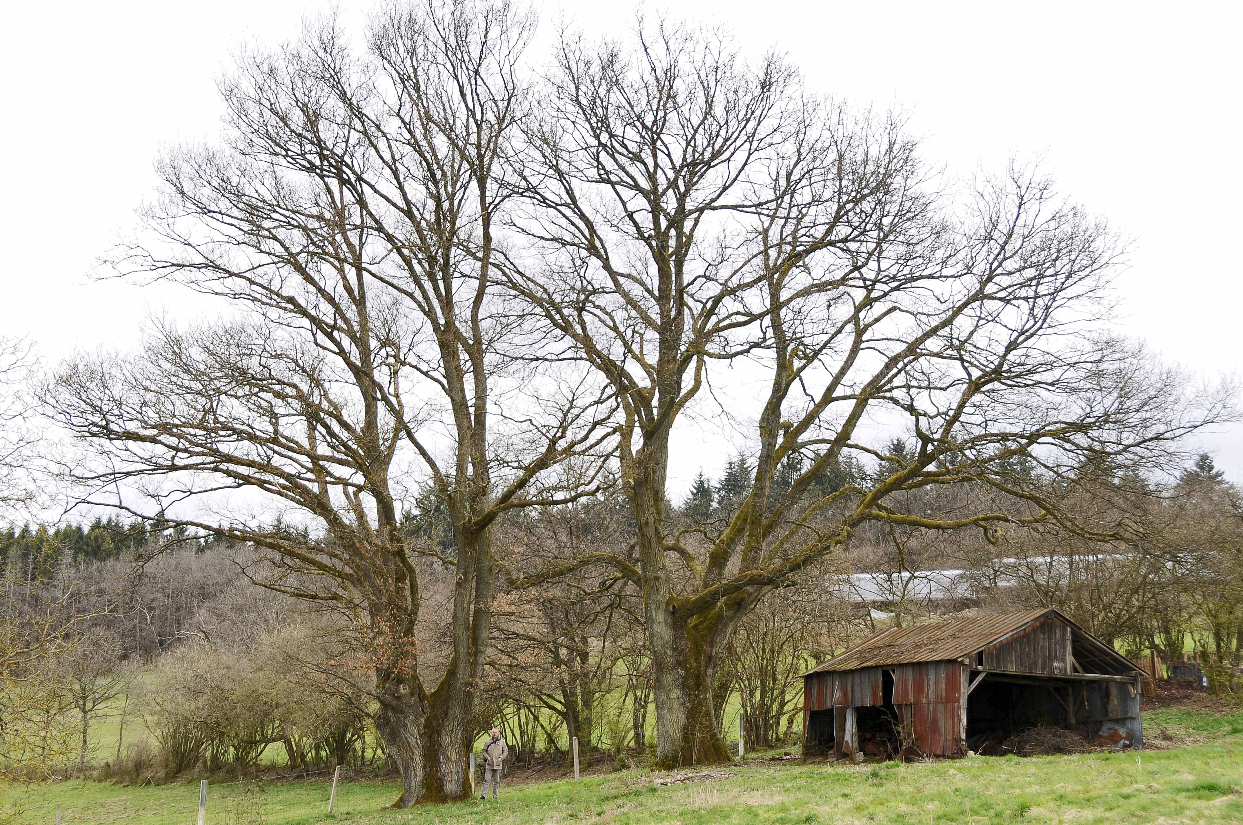 Eechen zu Munzen. Munzen + Kategorie:Gemeng Munzen